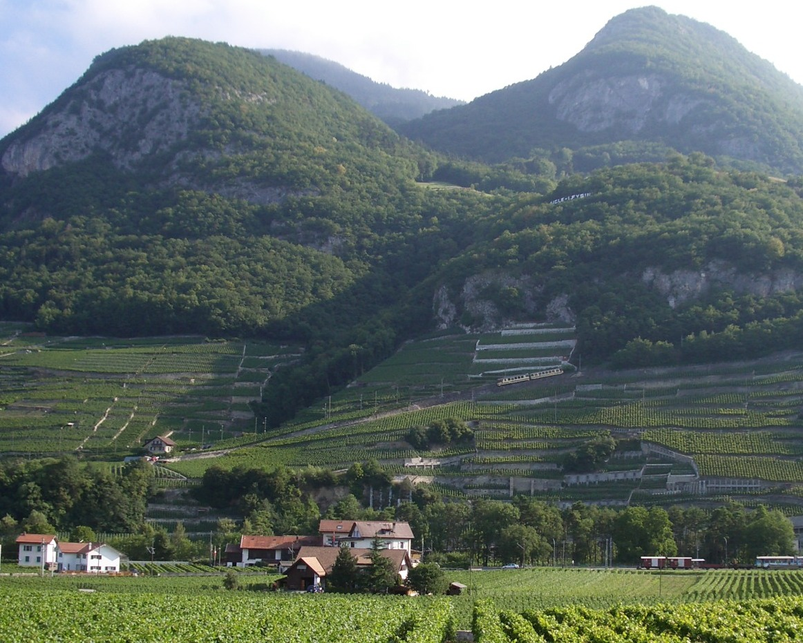 Aigle VD, Switzerland self-made, August 2006